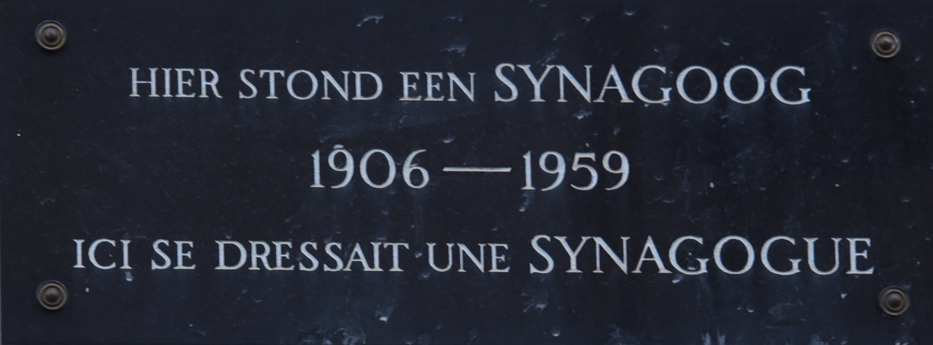 Gedenktafel Synagoge Brüssel-Stadt